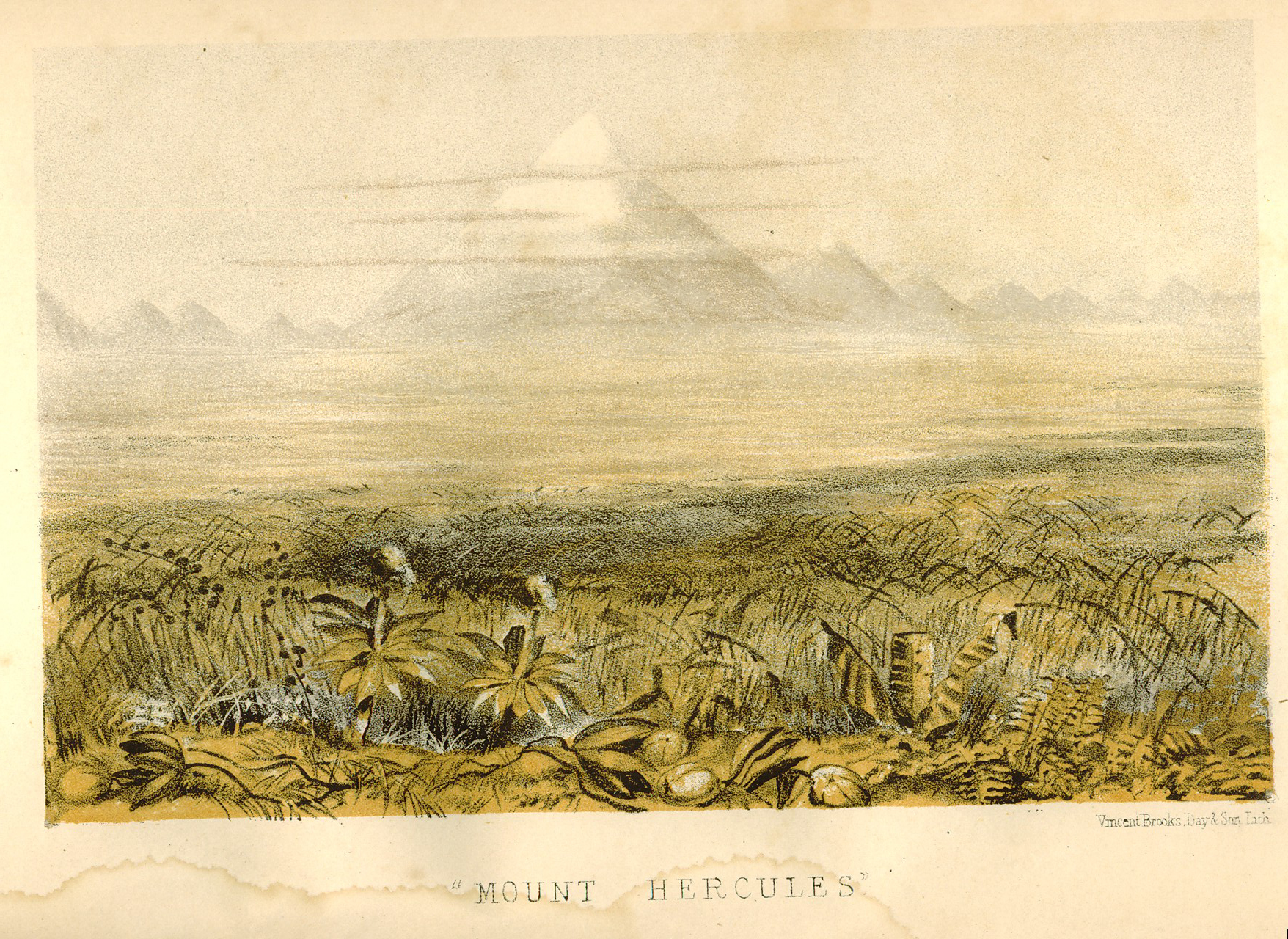 Vue du mythique mont Hercules en Nouvelle Guinée